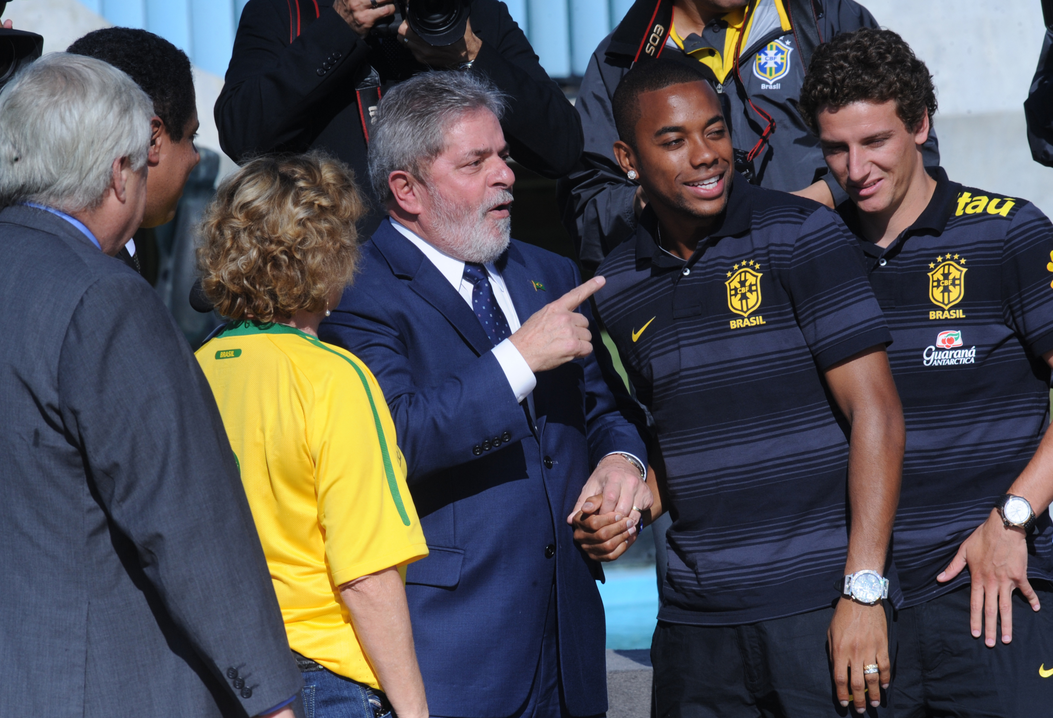 Brasília - Presidente Lula e a primeira-dama Marisa Letícia recebem a Seleção Brasileira de Futebol no Palácio da Alvorada.